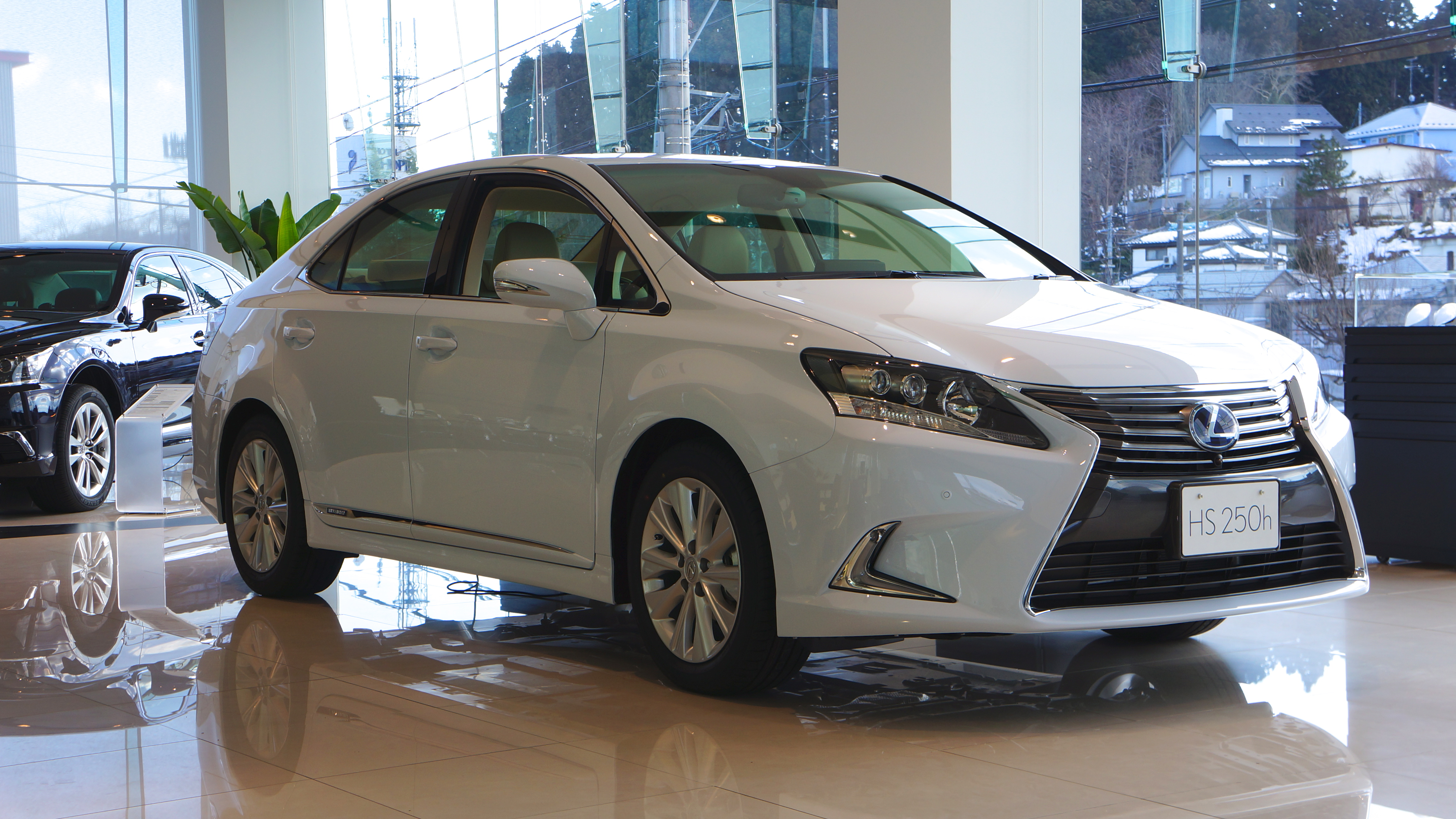 Lexus HS250h 2013 front japan